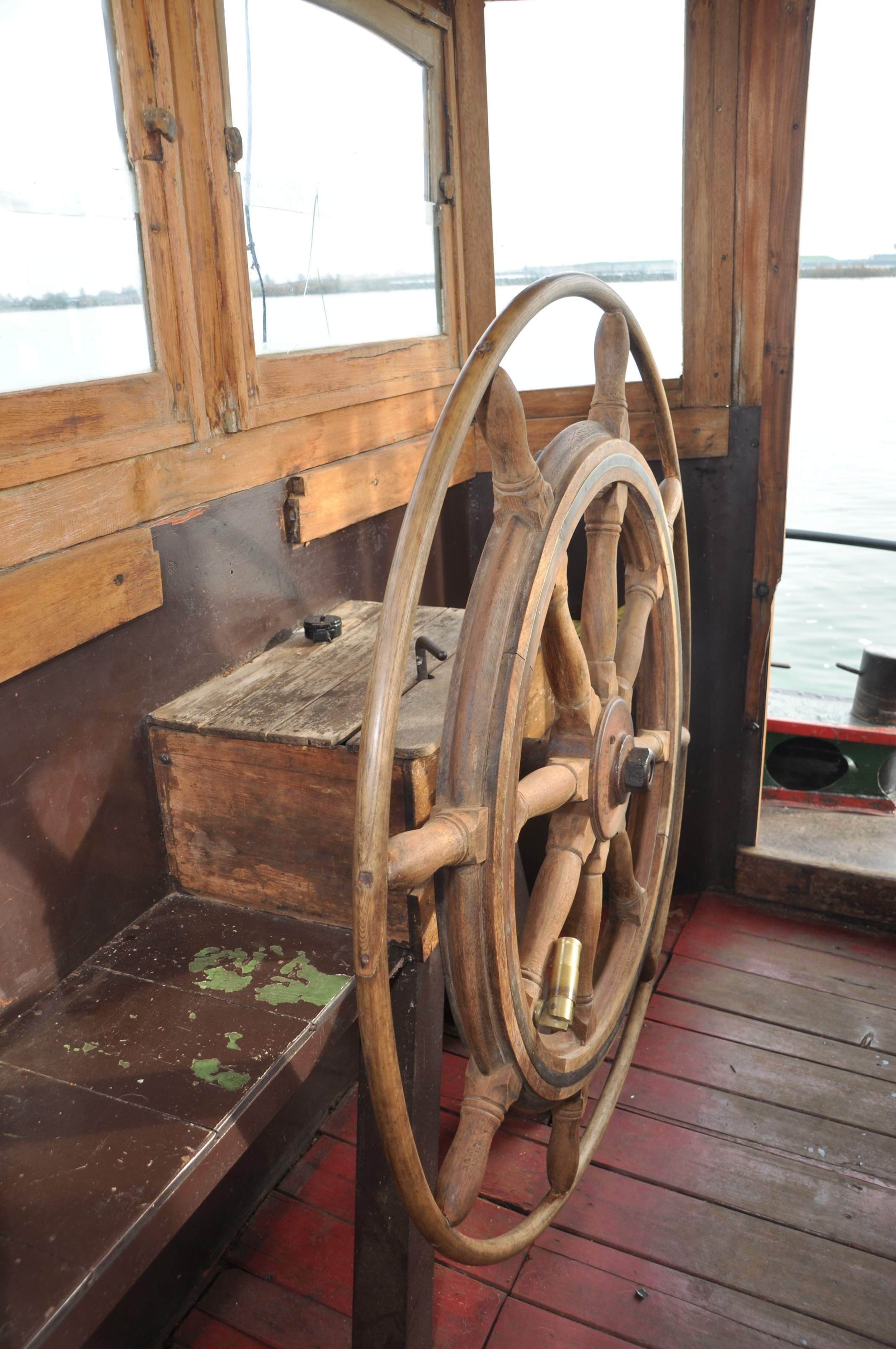 De TWEE GEBROEDERS voor de wal bij de klassieke schepenbeurs 2011 in Enkhuizen.